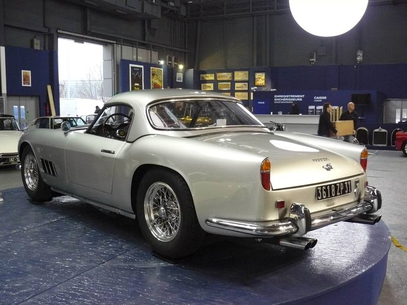 Retromobile 2012